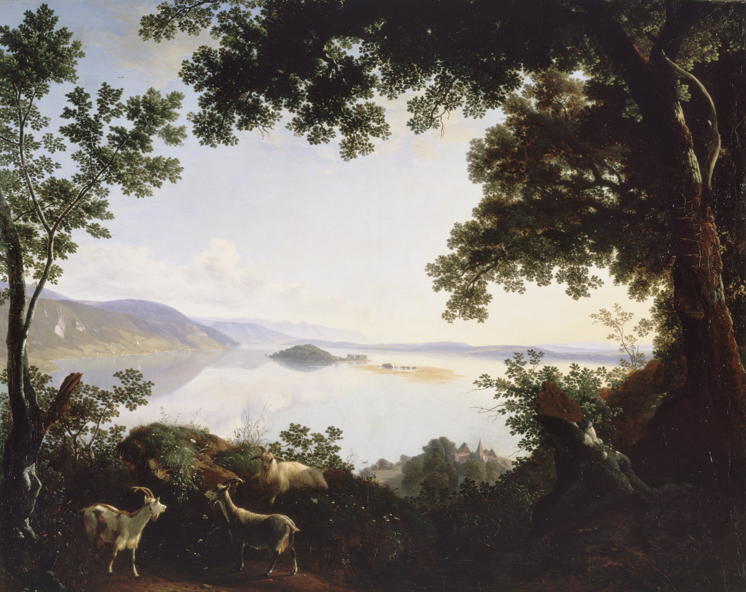 Vue de l’île de Saint-Pierre, Neuchâtel, musée d'art et d'histoire.